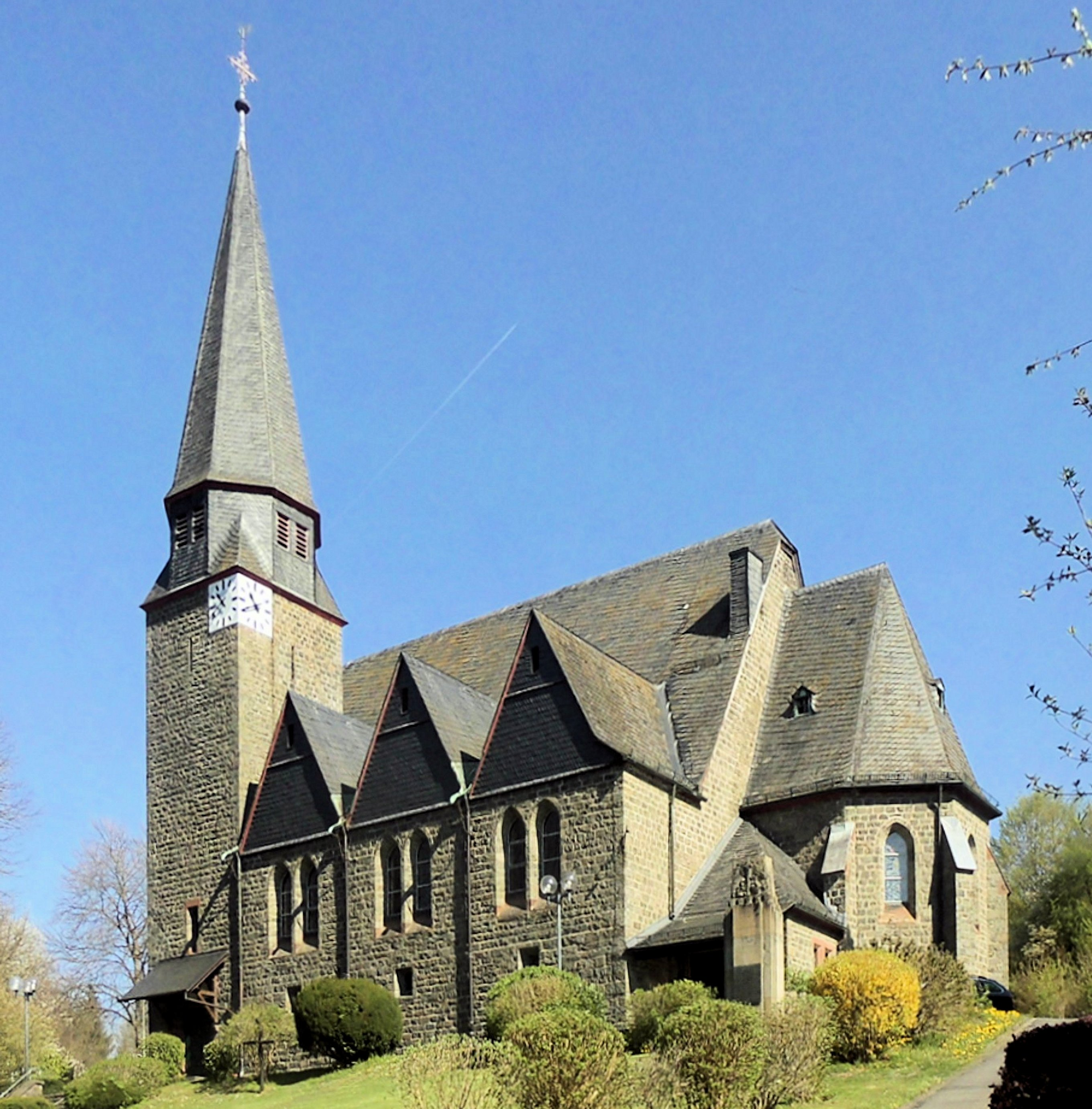 Evangelische Kirche in Denklingen, Oberbergischer Kreis, Nordrhein-Westfalen, Deutschland